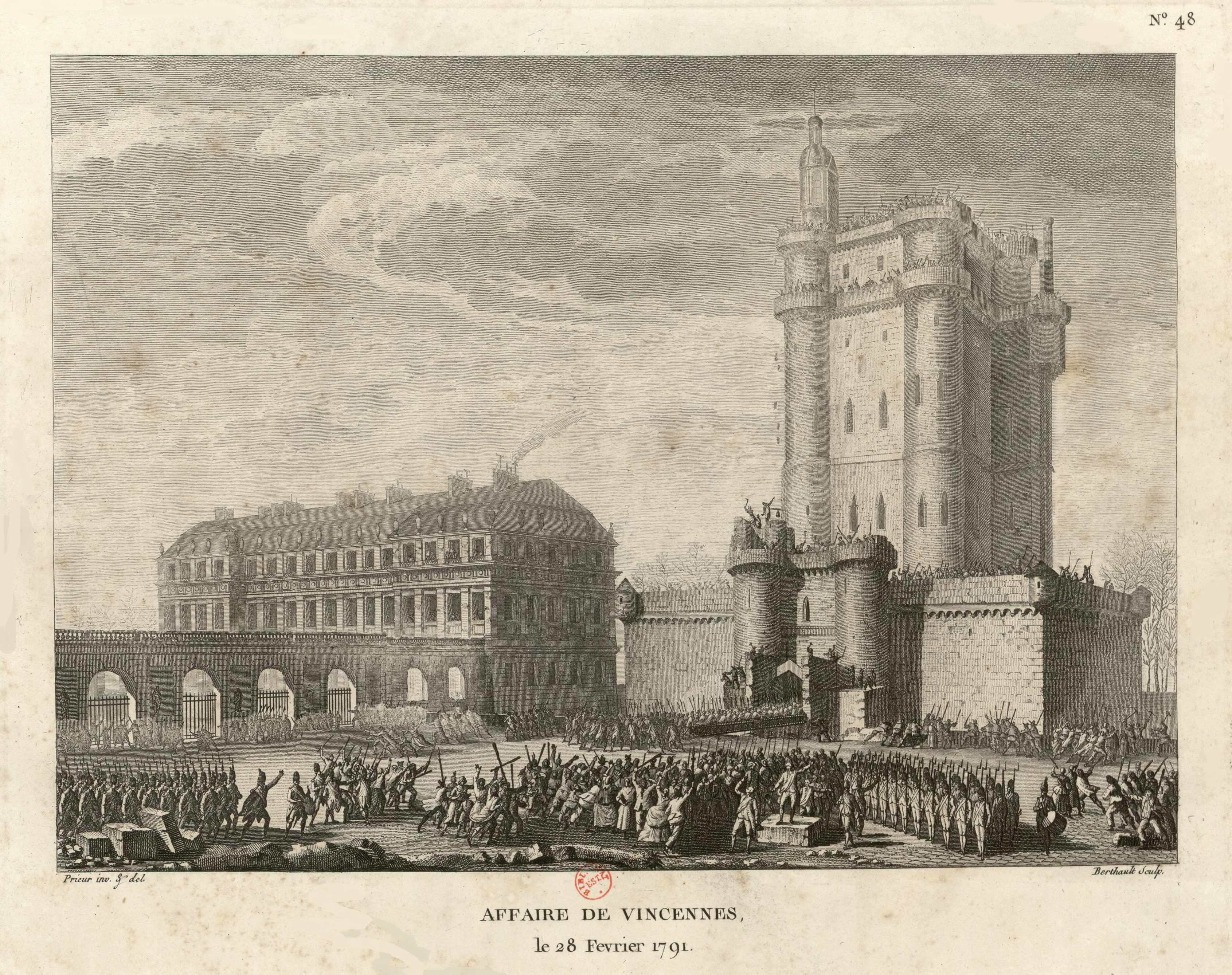 Affaire de Vincennes, le 28 février 1791.